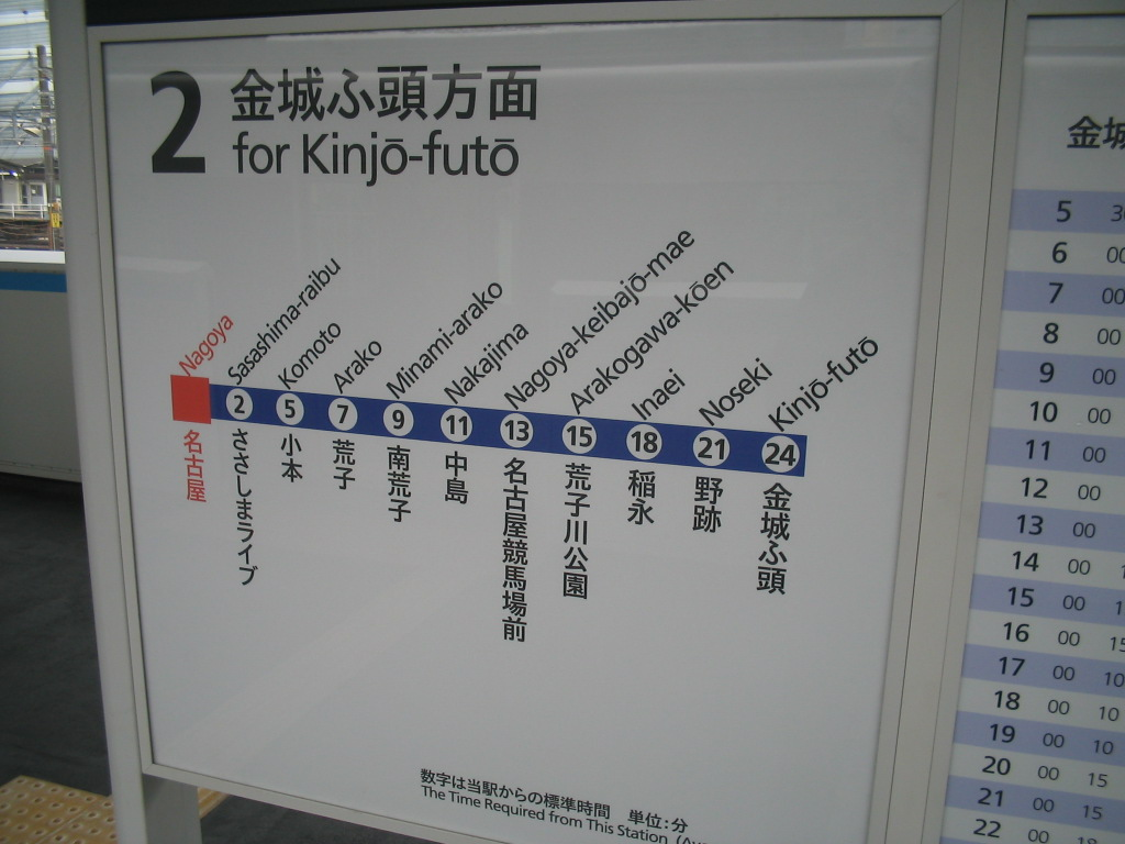 Aonomilijn haltebord, Nagoya